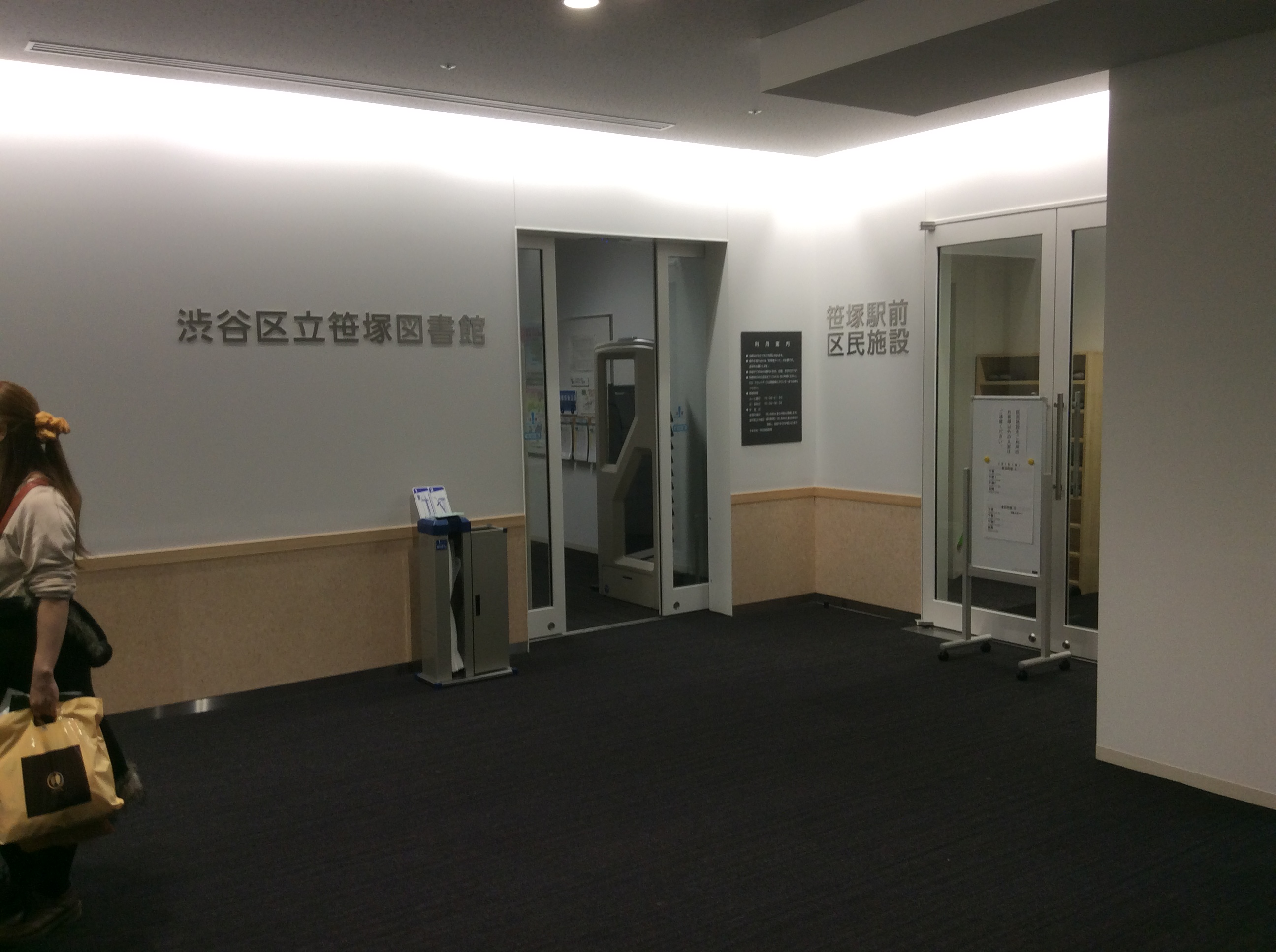 （2015年4月1日撮影）